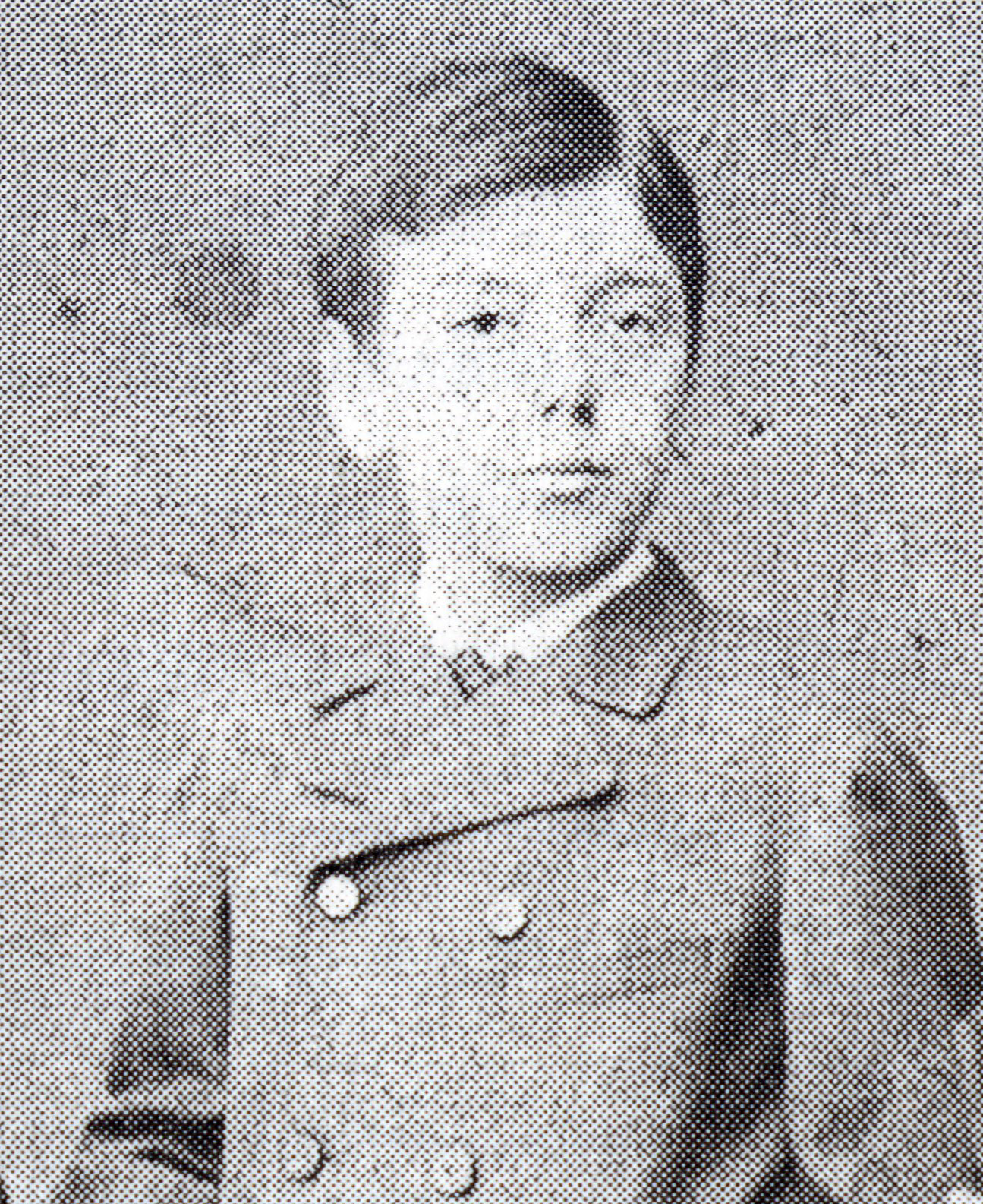 Johannes Leonardus Kleintjes (1891-1955), detail van een foto waarop ook zijn halfbroer Philip en zijn broer Leo staan afgebeeld